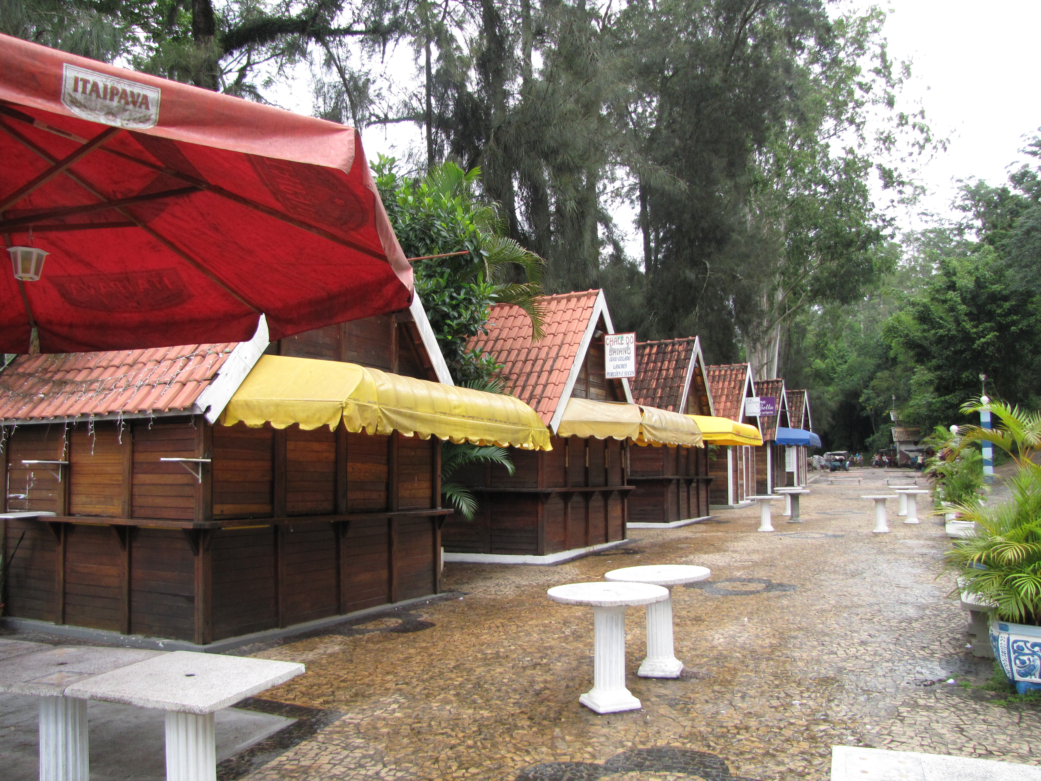 Feirinha de artesanato em dia de folga